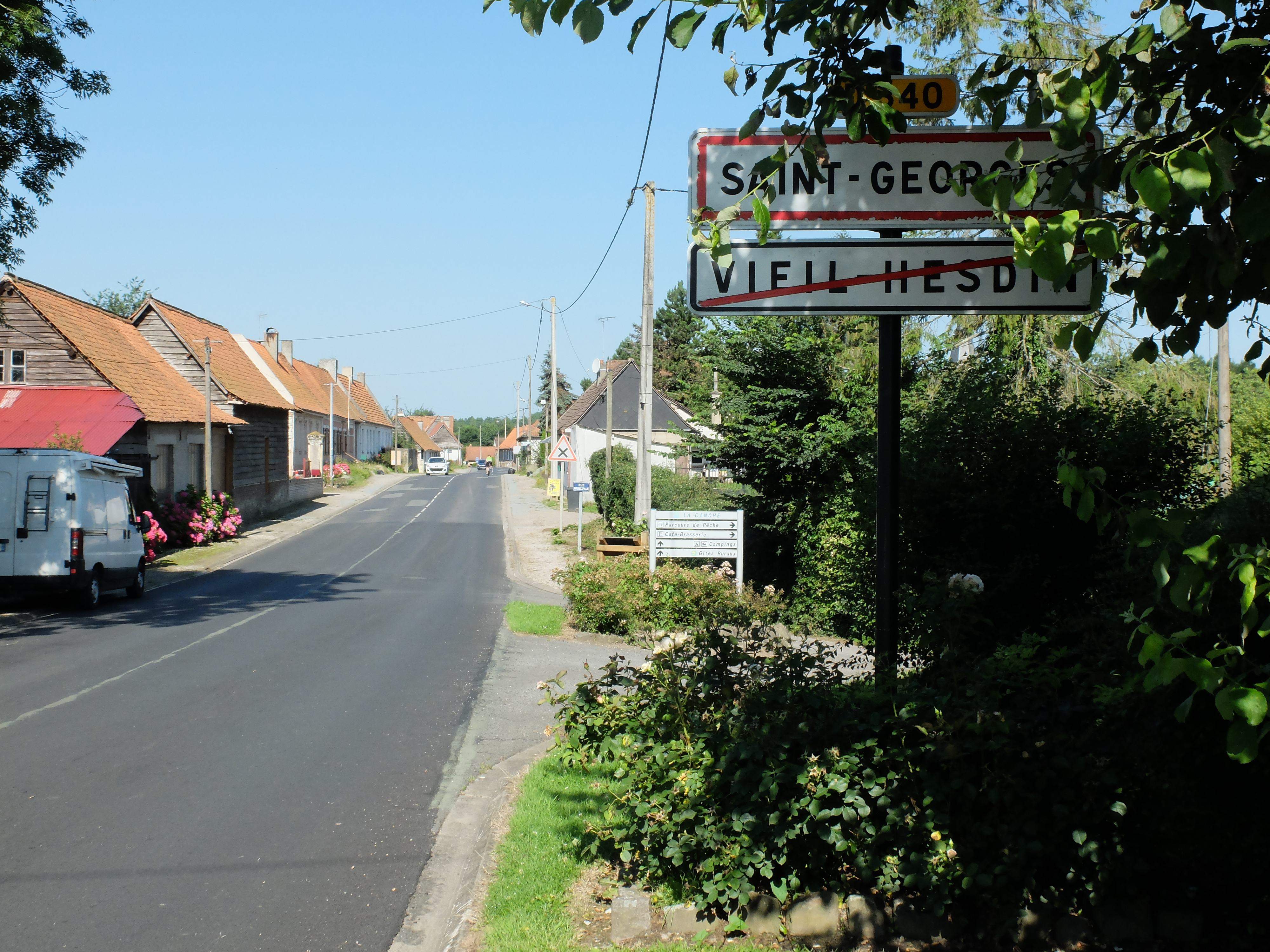 Vue d'une entrée de la commune de Saint-Georges (Pas-de-Calais).